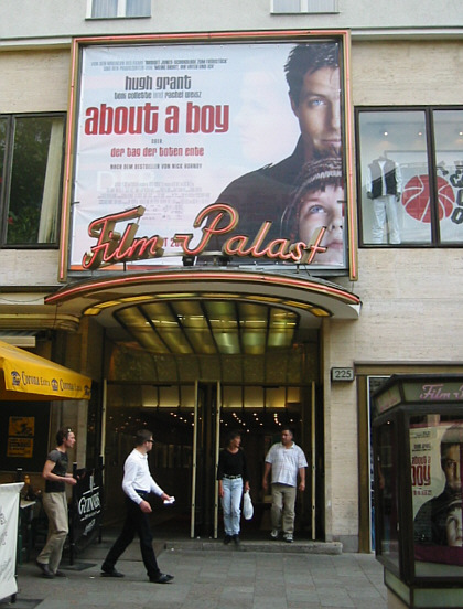 Berlin-Charlottenburg, Germany: Film-Palast cinema, Kurfürstendamm 225